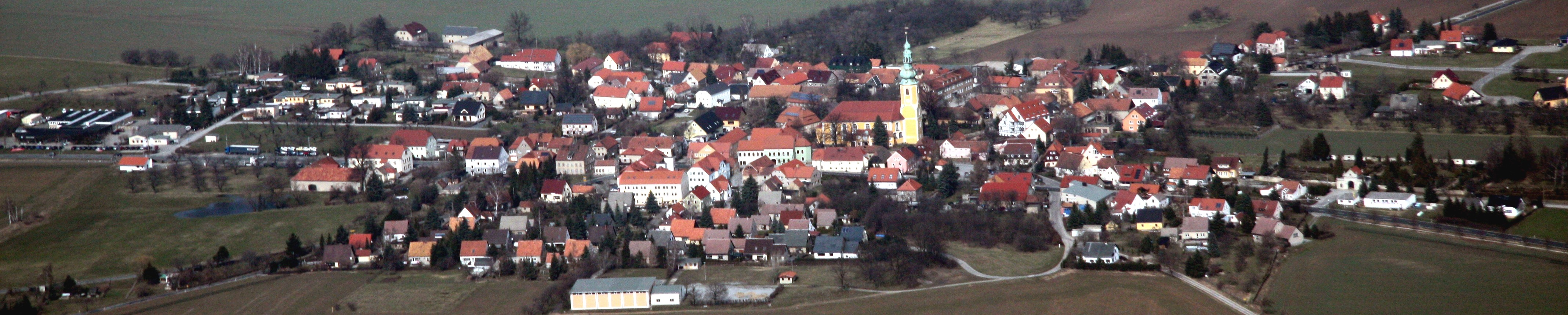 Hochkirch